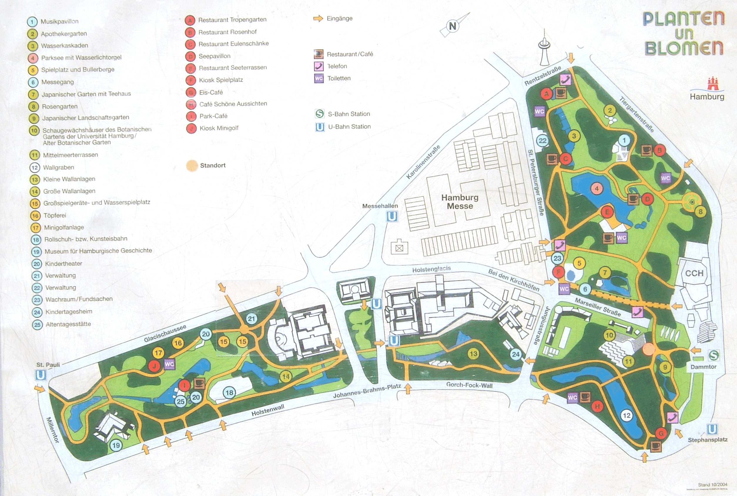 Hamburg, Park "Planten un Blomen", Karte. Stand 10/2004